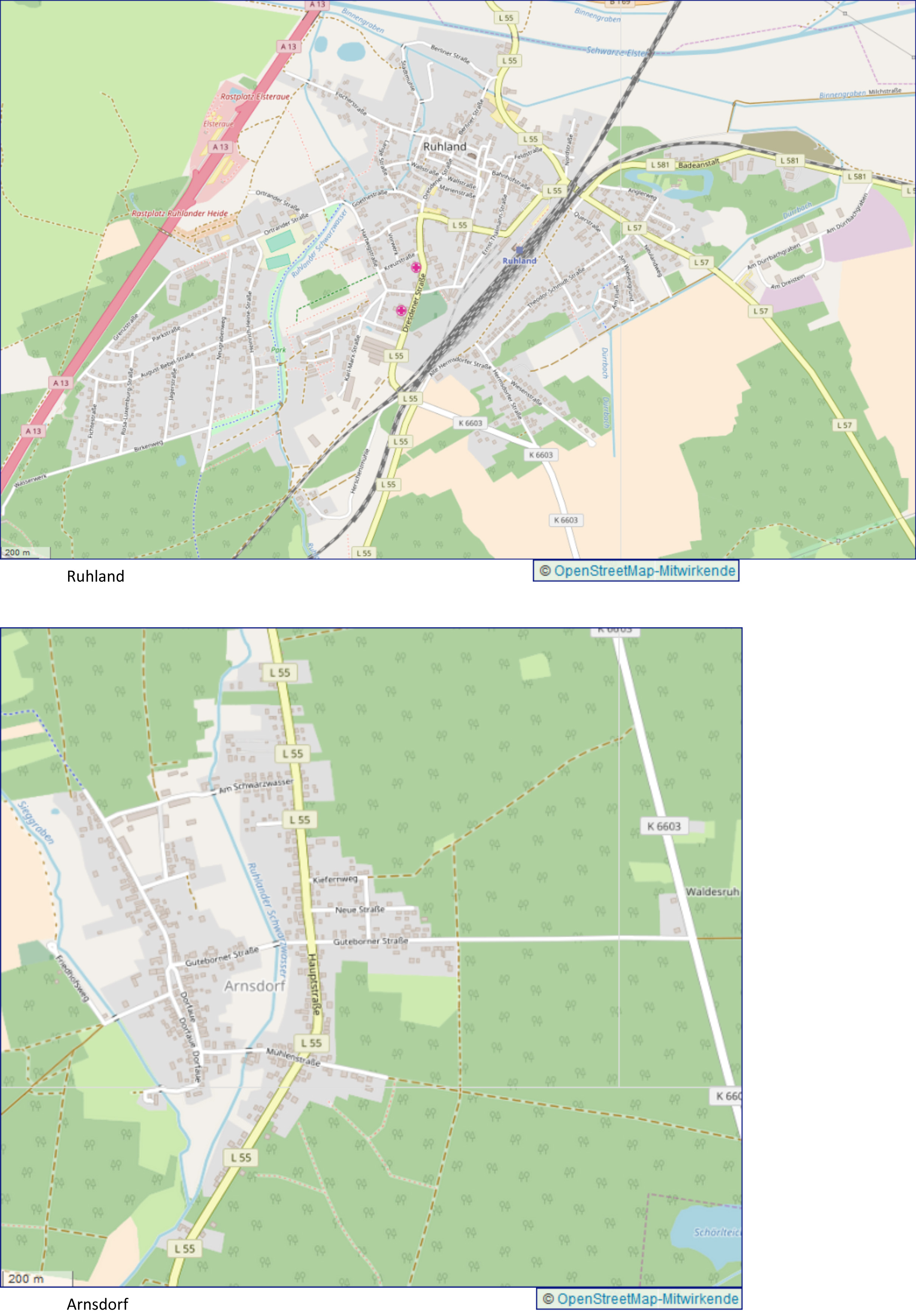 Ruhland Stadtplan - mit OT Arnsdorf; Straßen in Ruhland aus OpenStreetMap